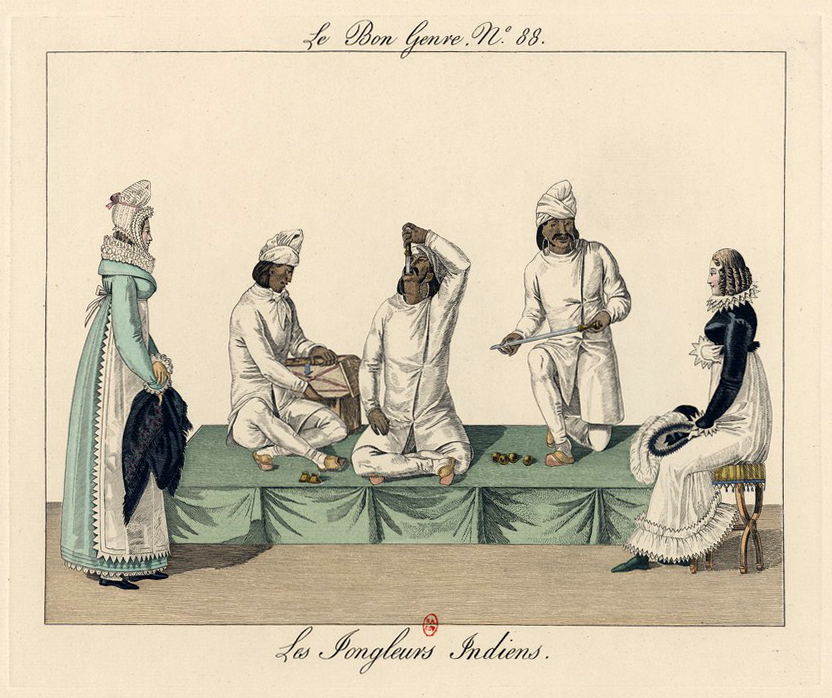 Gravure coloriée à la main de la série Le Bon Genre publiée par Pierre de la Mésangère.